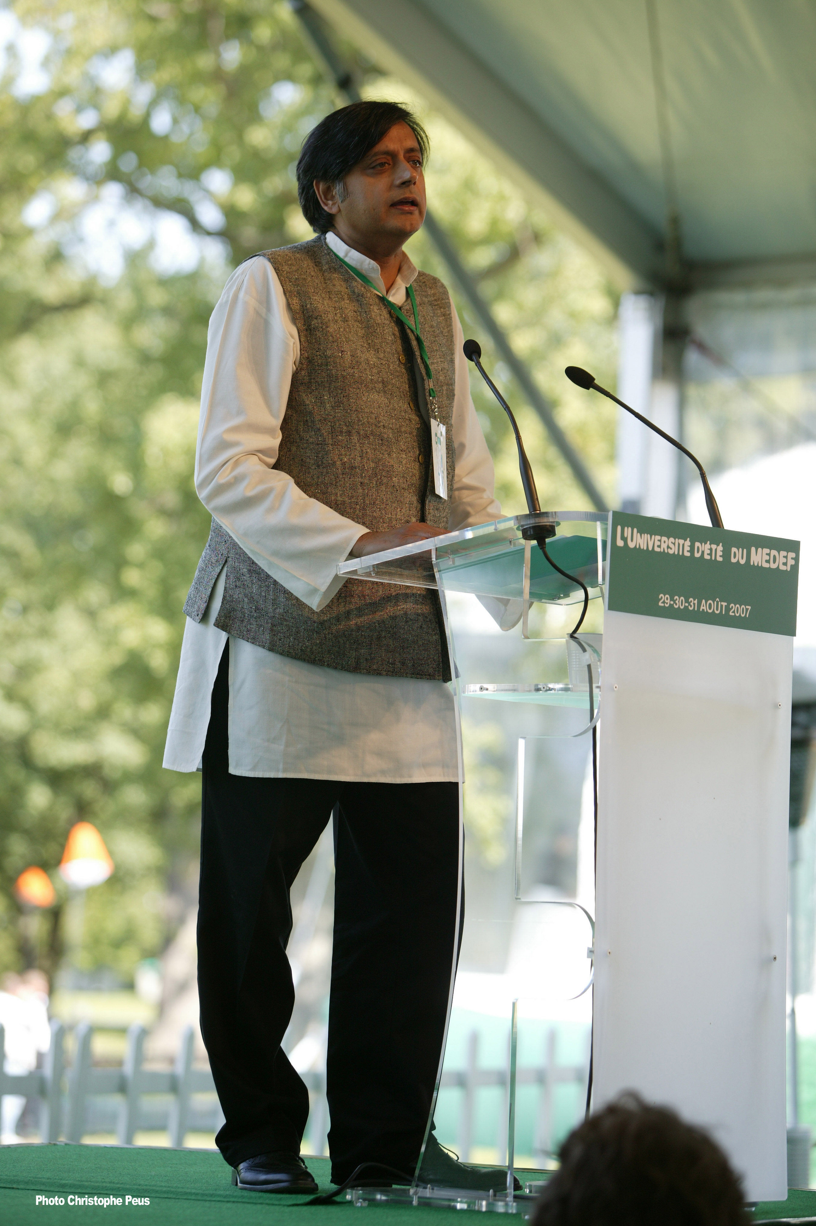 Université d'été du MEDEF 2007